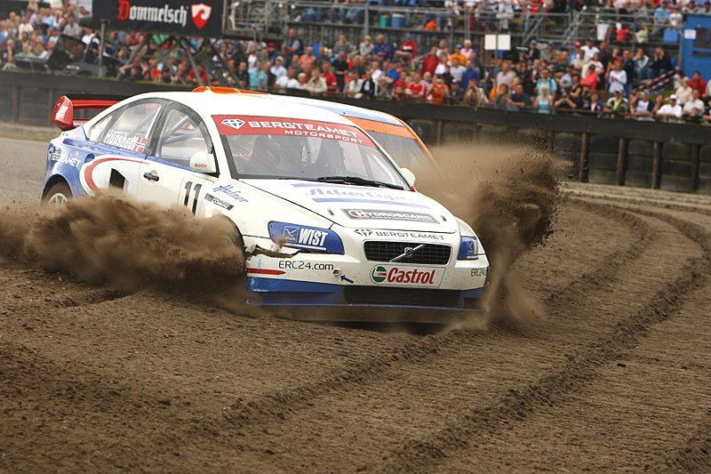 Der Norweger Ludvig Hunsbedt (Volvo S40) und der Schwede Andreas Eriksson (Ford Fiesta ST) fliegen beim Rallycross gemeinsam ins Kiesbett.